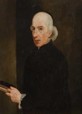 Ritratto di Saverio Bettinelli, olio su tela, Accademia Nazionale Virgiliana, Mantova